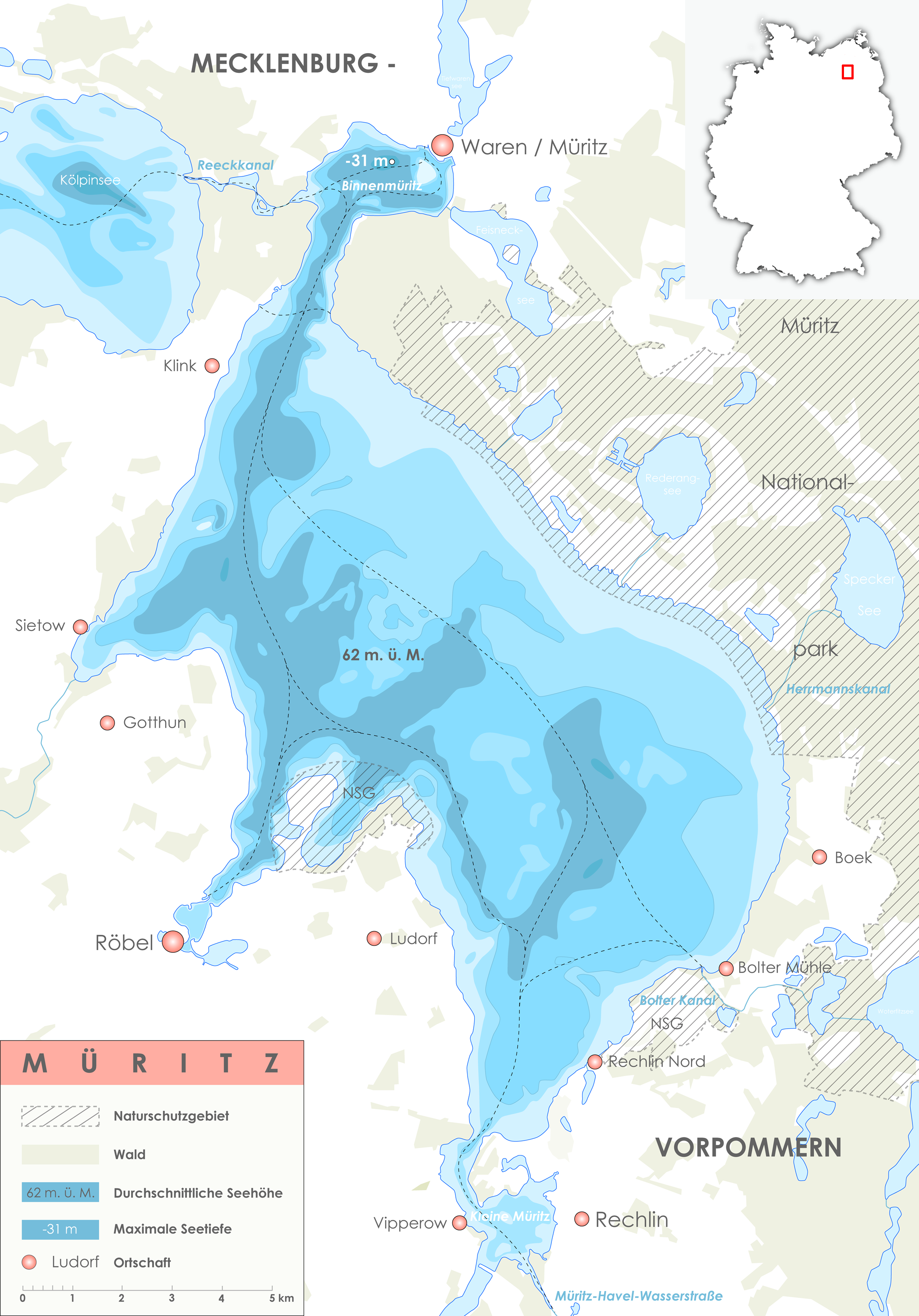 Die Müritz